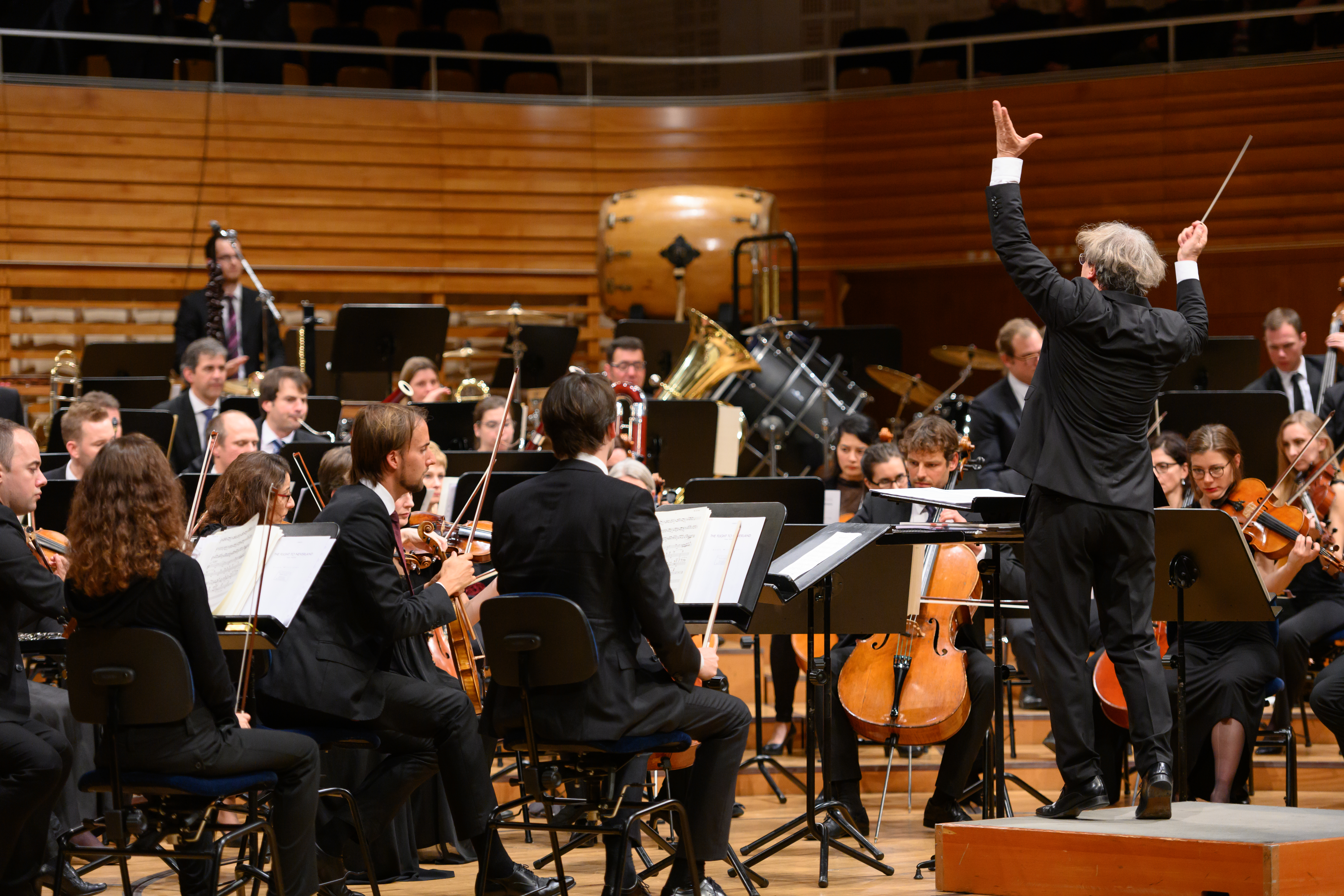 21CO Konzert